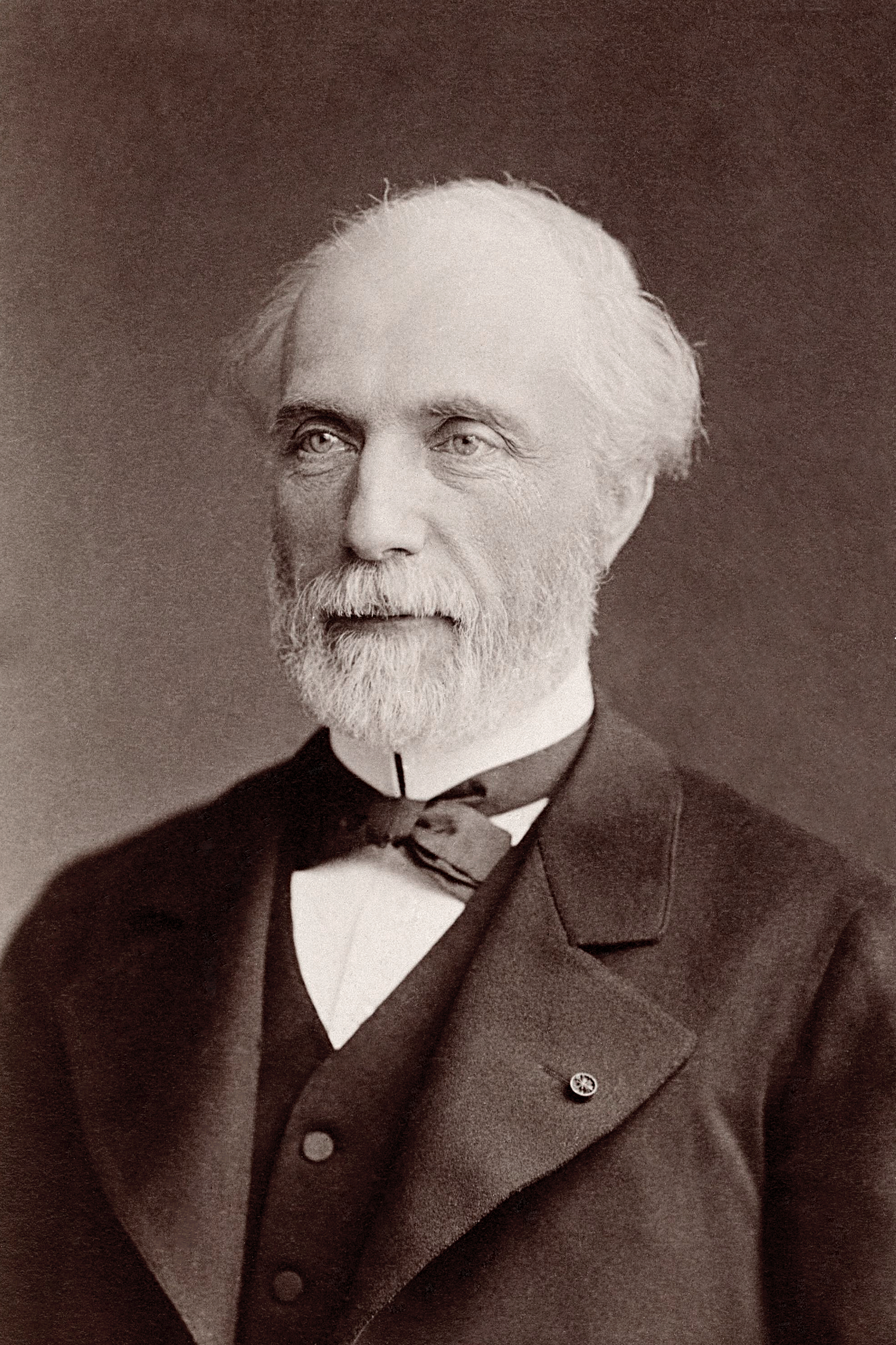 Charles de Saulces de Freycinet (1828 - 1923), homme d'état et ingénieur français.